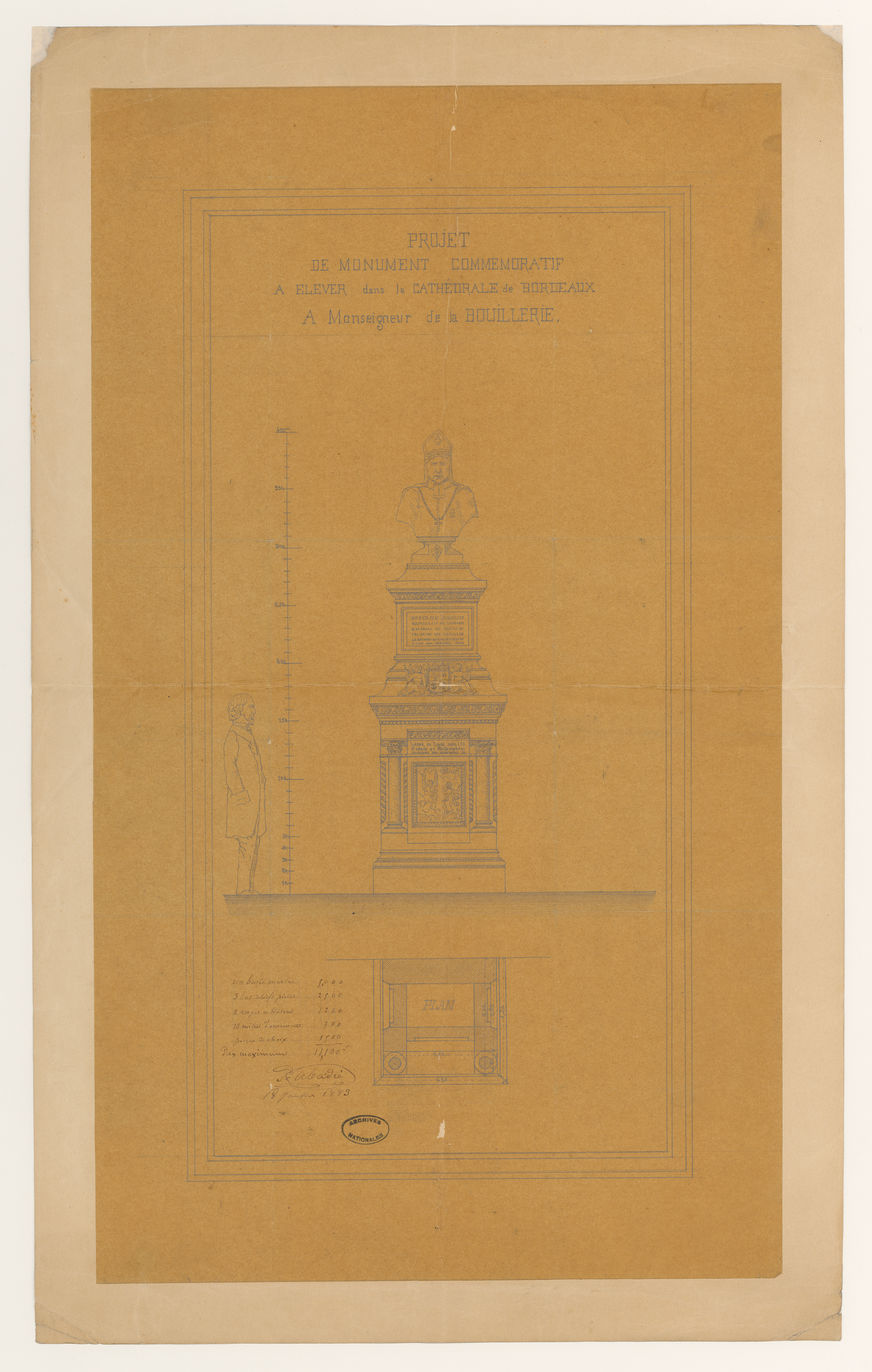 Projet de monument commémoratif à élever dans la cathédrale de Bordeaux à Monseigneur de la Bouillerie (avec détail du décor sculpté). Dessin tiré des dossiers de travaux de restauration des cathédrales (1802-1912), conservés aux Archives nationales (inventaire et autres documents numérisés consultables en ligne).